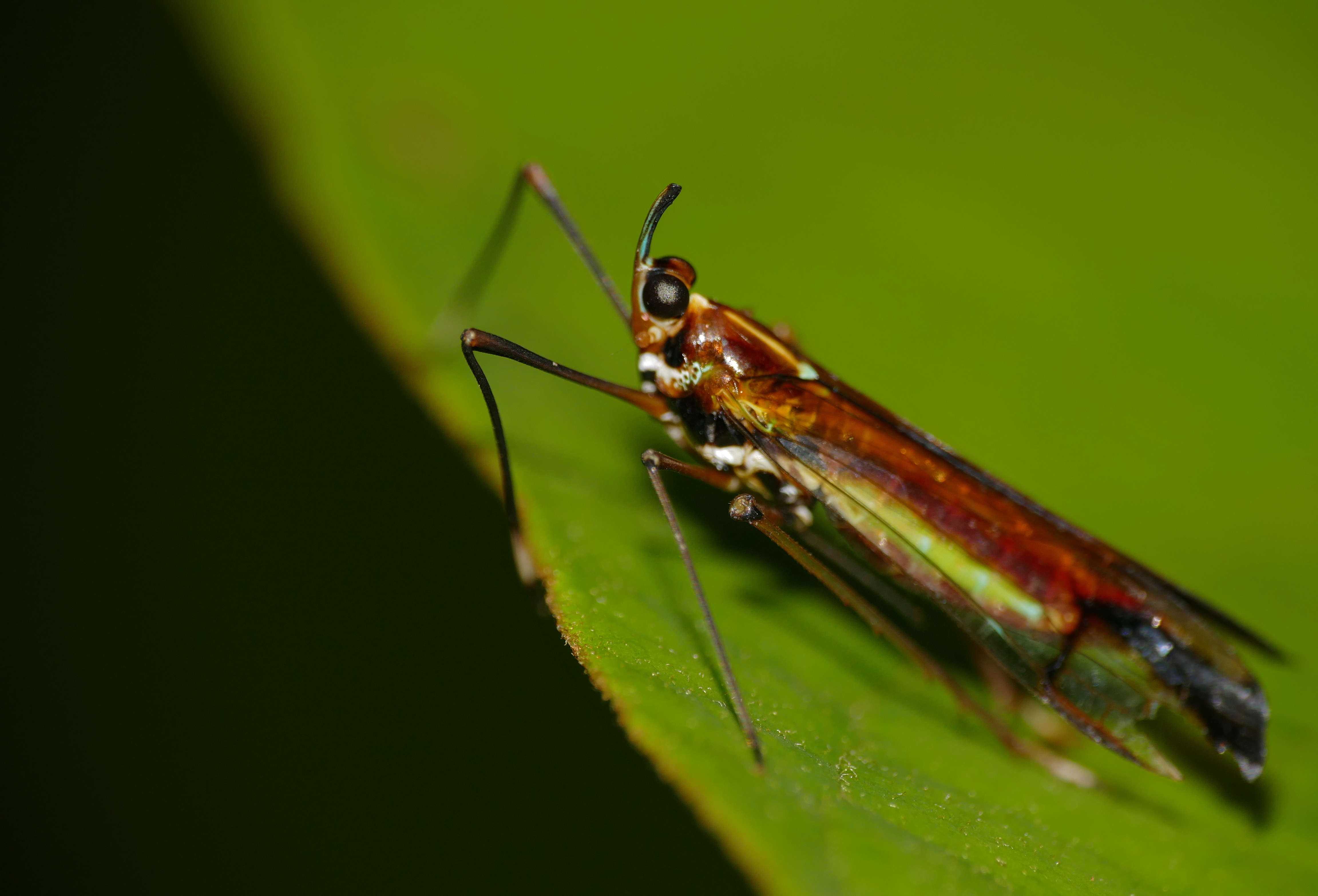 Mulu NP, Sarawak, MALAYSIA